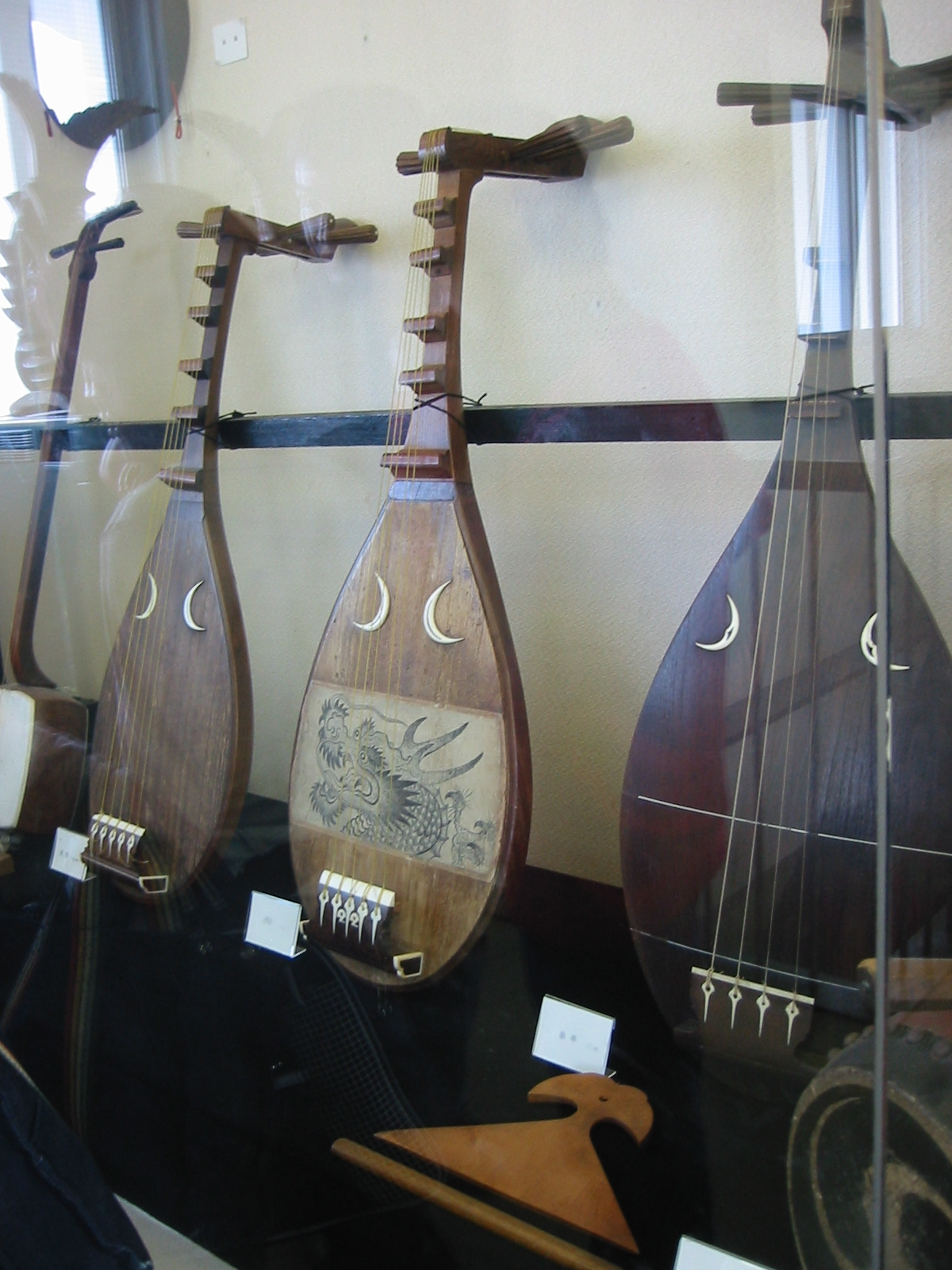 岐阜城資料館にて